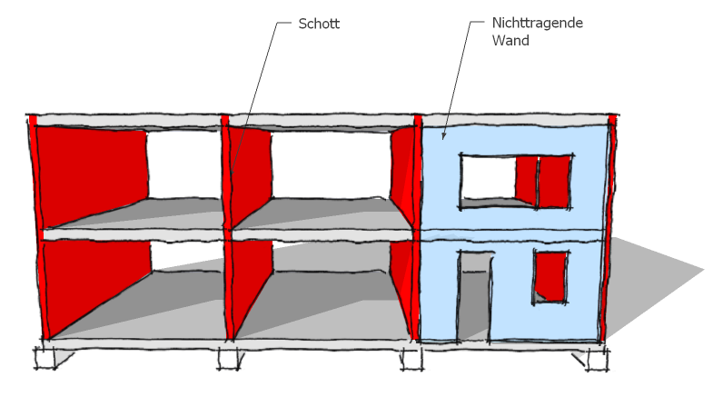 Skizze zur Darstellung der Schottenbauweise mit Text